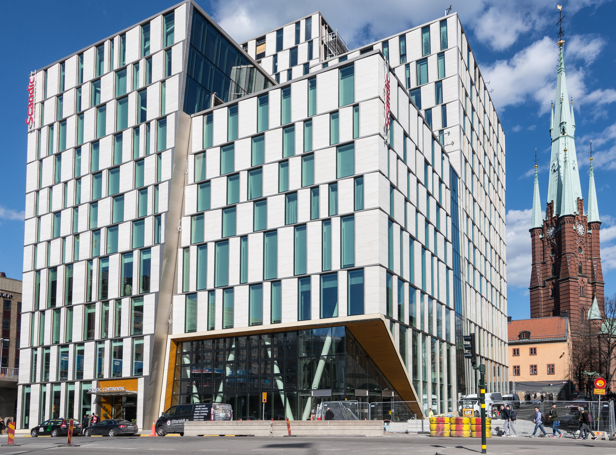 Scandic Continental Stockholm den 12 april 2016.